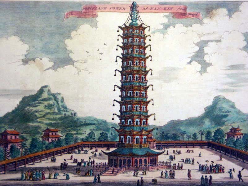 Lituð mynd af Postulínsturninum af Nanjing